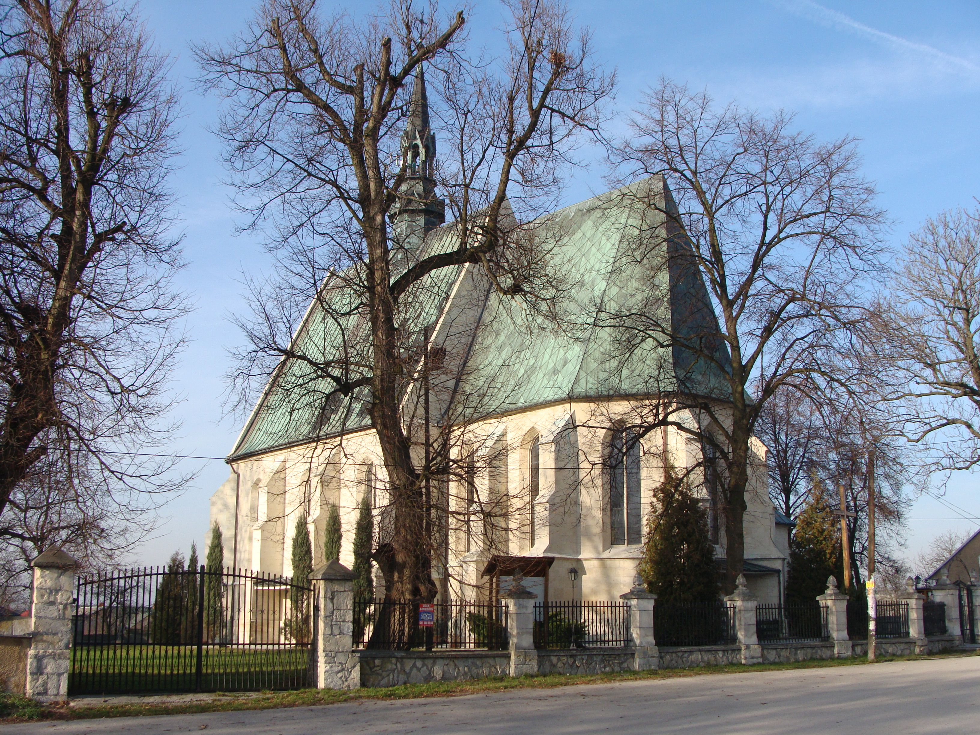 Szaniec kościół